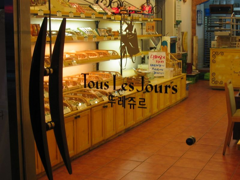 Date : février 2005 Source : photo personnelle du contributeur Mammique Description : Intérieur d'une boutique Tous les jours, chaîne de boulangeries de Corée, à Musan en Corée. Licence